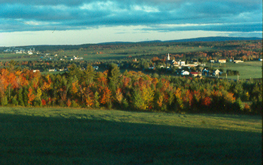 Photographie de Saint-Camille.